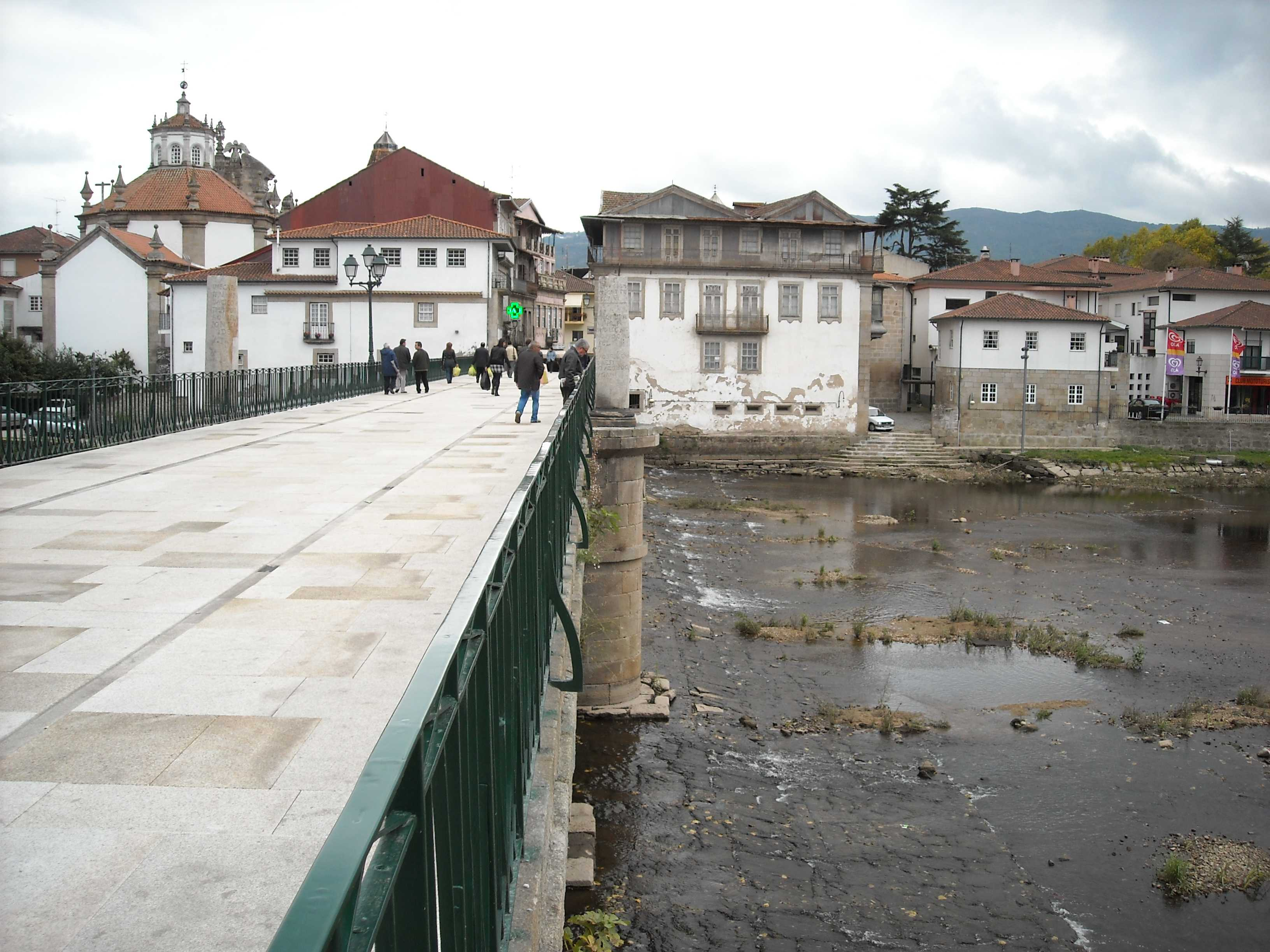 Chaves, Portugal, noviembre 2008 Chaves, Portugal, noviembre 2008